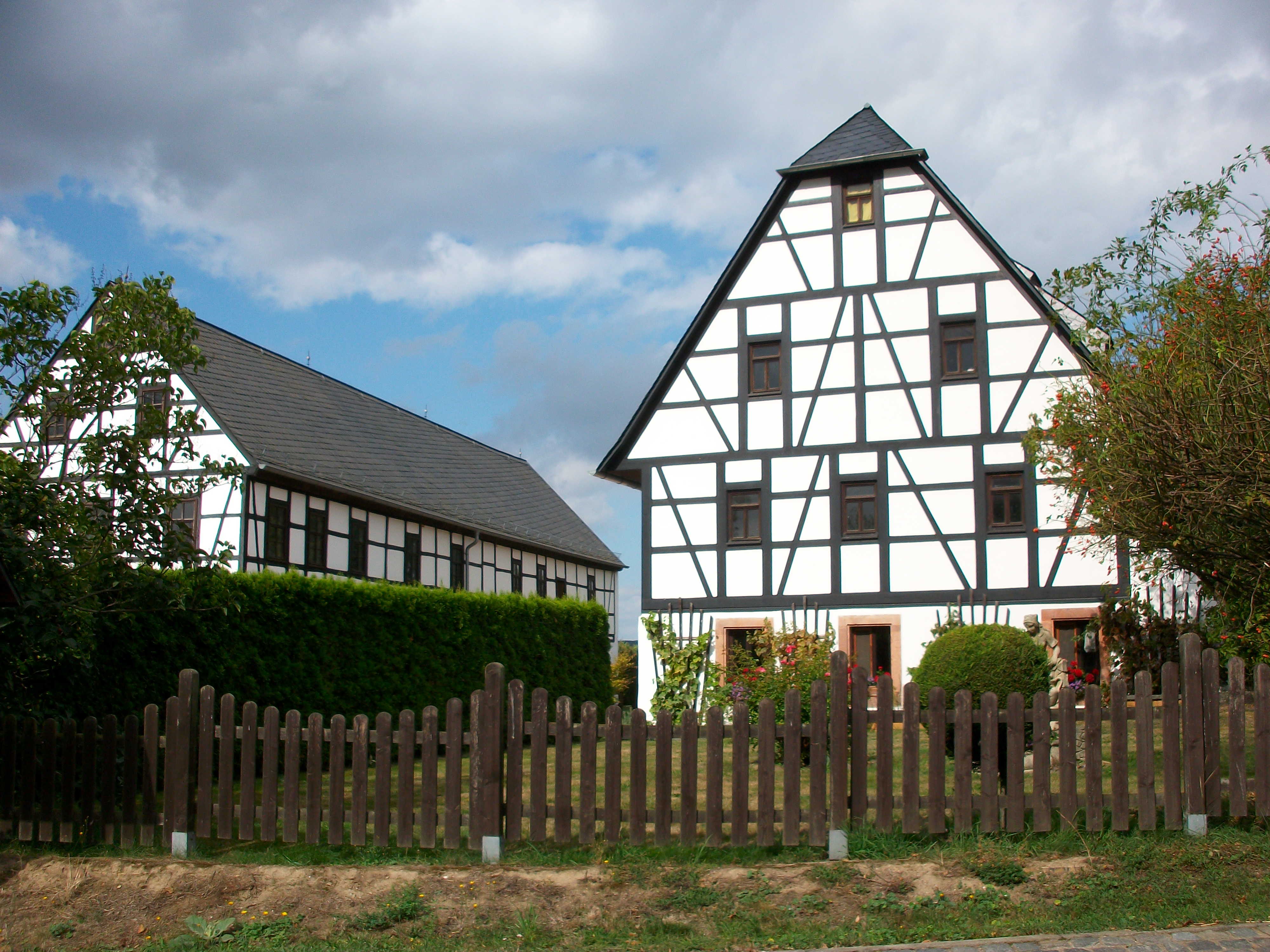 Beedeln, Untere Dorfstraße 18